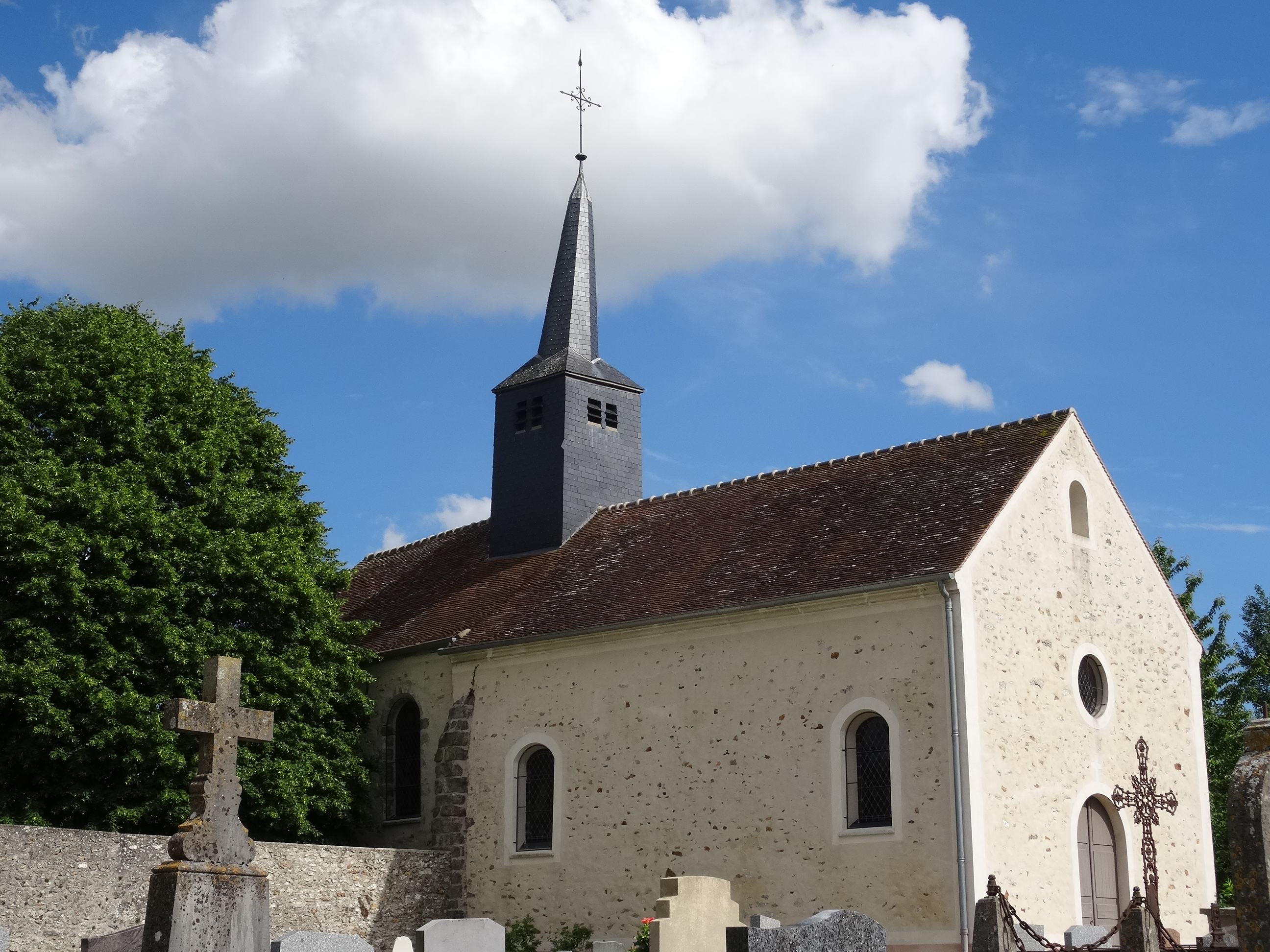 Église Saint-Denis-et-Saint-Christophe de Leudon-en-Brie. (Seine-et-Marne, région Île-de-France).